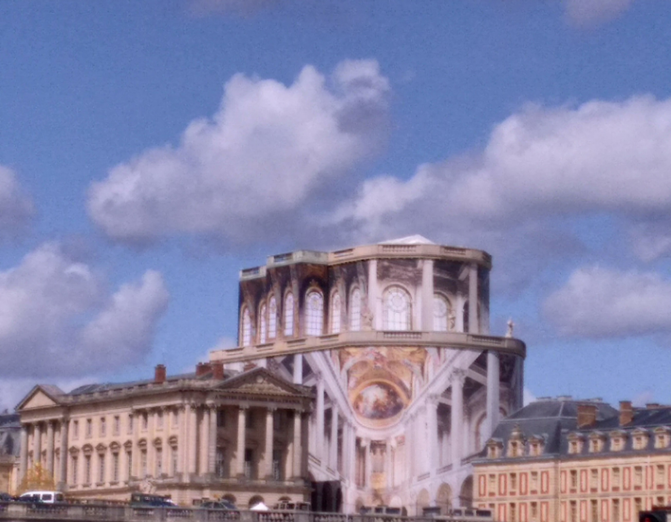 prise de vue depuis la place d'armes